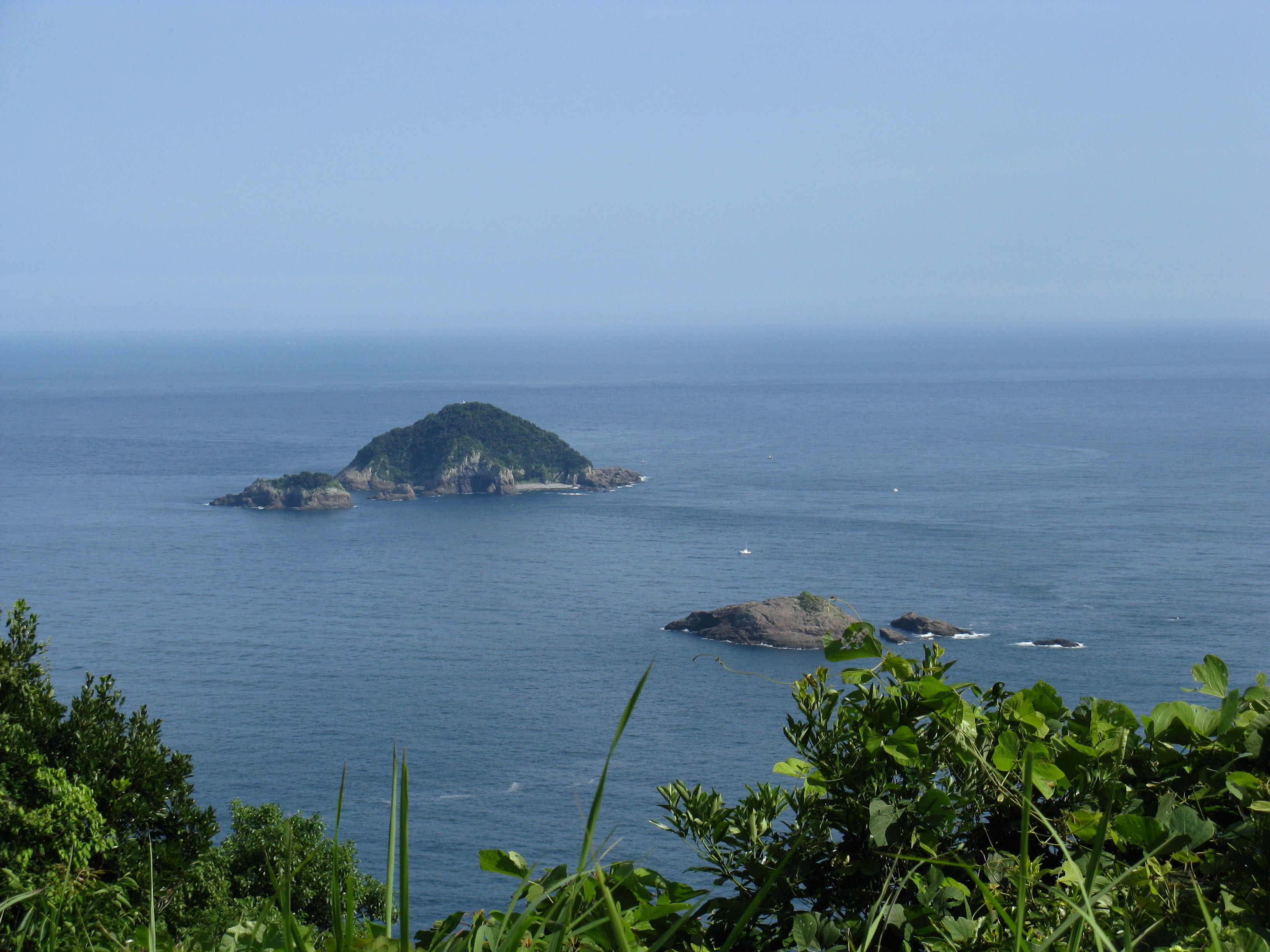 枇榔島（びろうじま）